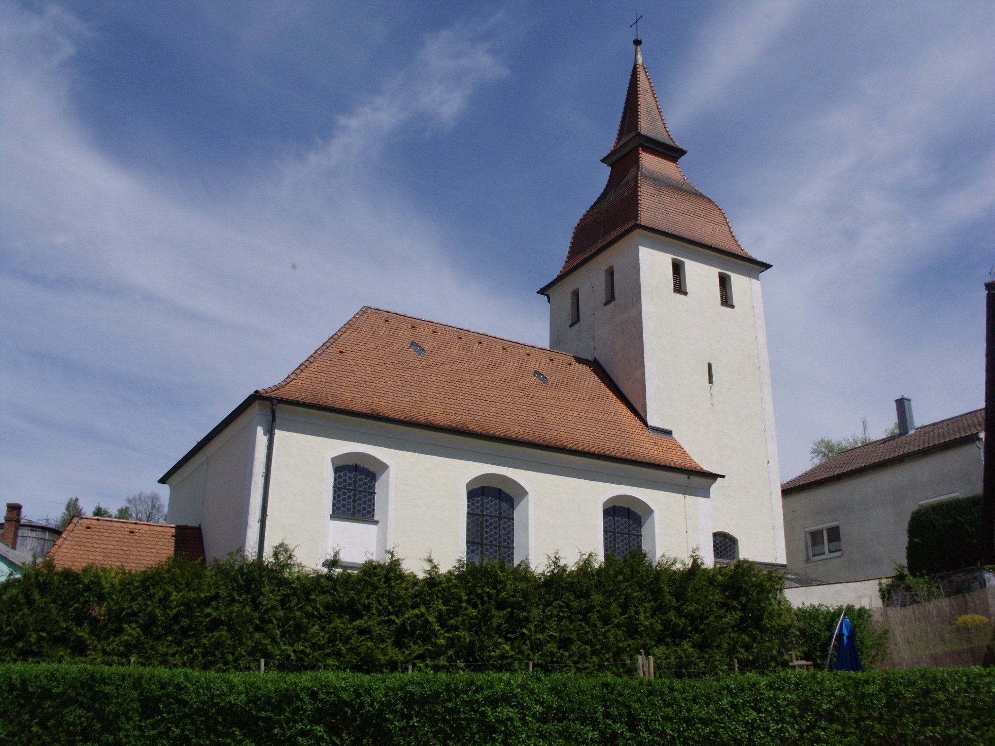 Gersdorf, Ortsteil des Marktes Nennslingen im Landkreis Weißenburg-Gunzenhausen, Bayern, Kath. Filialkirche St. Nikolaus